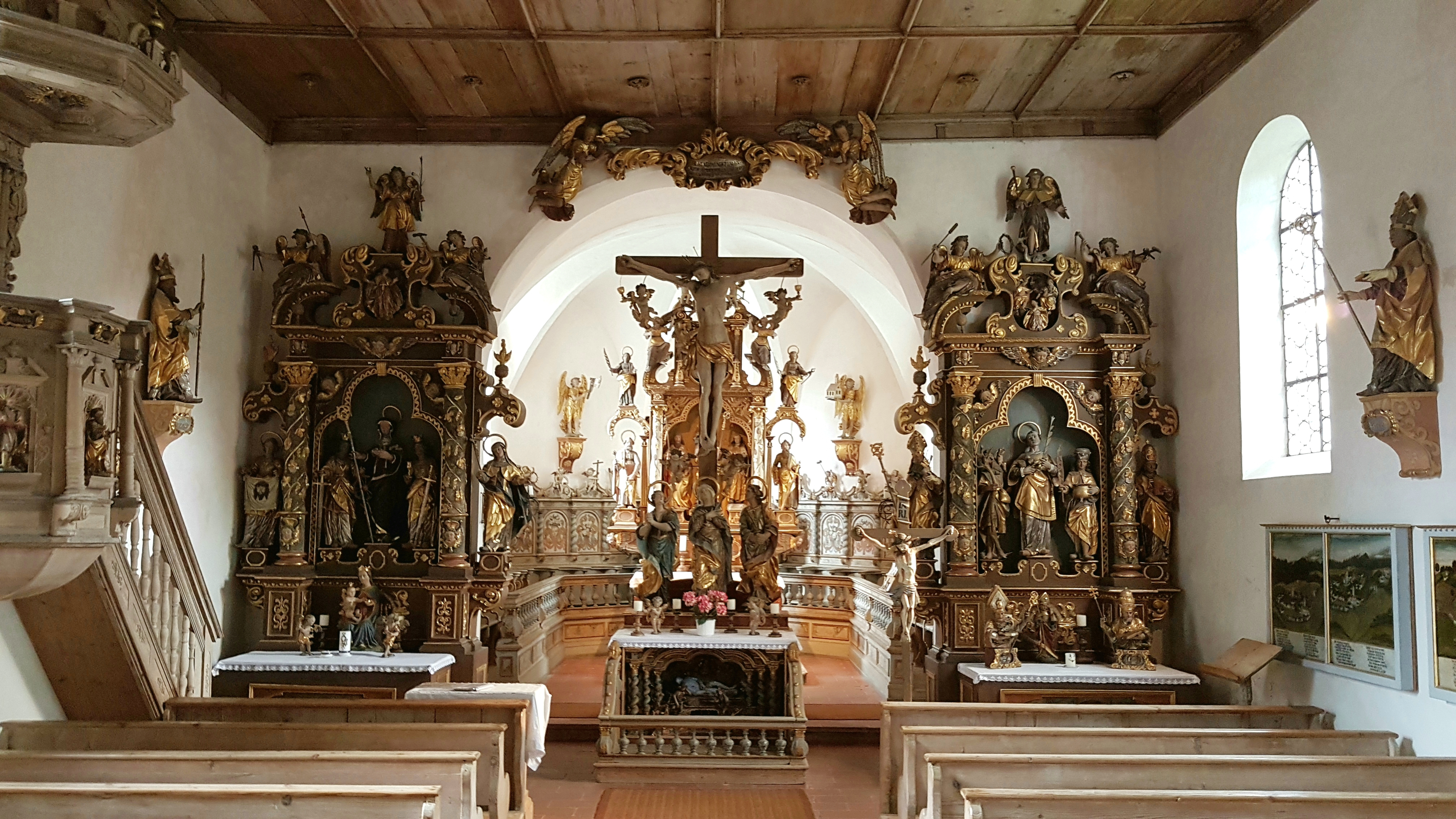 Thaining, Kirche St. Wolfgang, Innenansicht mit den 4 Altären (Spätwerke des Frühbarocks) und der Kanzel.